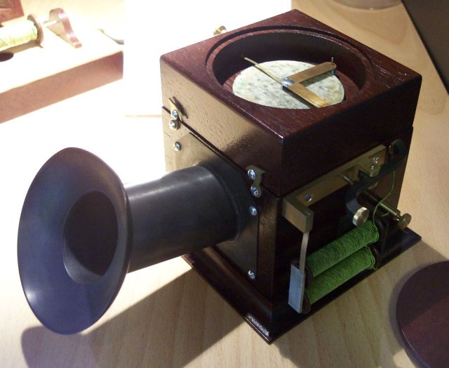 Nachbau des Telefons von Philipp Reis, Sprechseite, Nixdorfmuseum, 2004